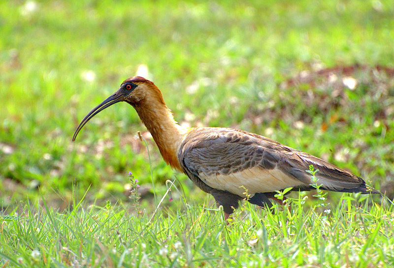 Theristicus caudatus Antiga estrada Piraju / Sarutaiá, próximo à cidade de Sarutaiá-SP